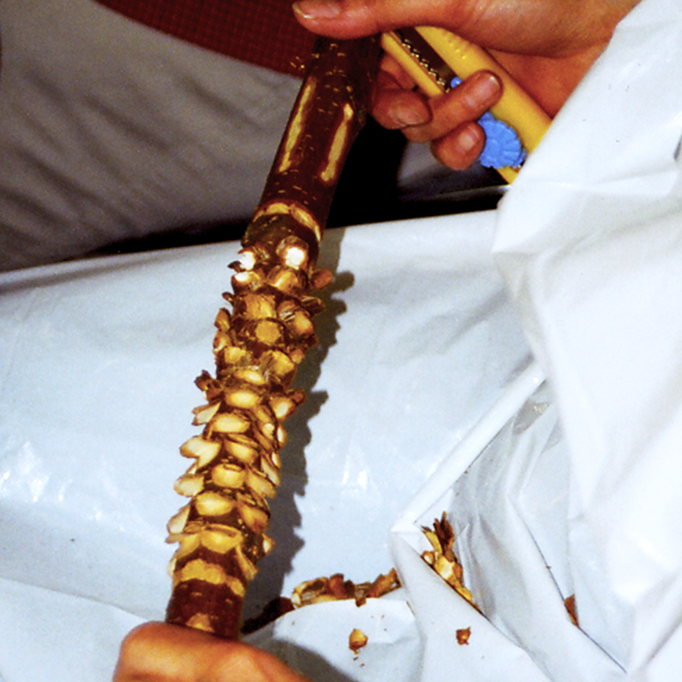 Bâton de parole sculpté par une des participantes à l'action performative « L'Arbre, ce livre ». (Roberval, 2005)